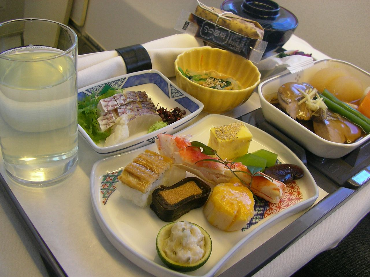 JAL